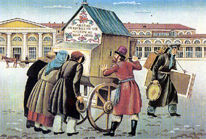 Раёк, или потешная панорама — популярное развлечение российских ярмарок. Лубок, XIX в.